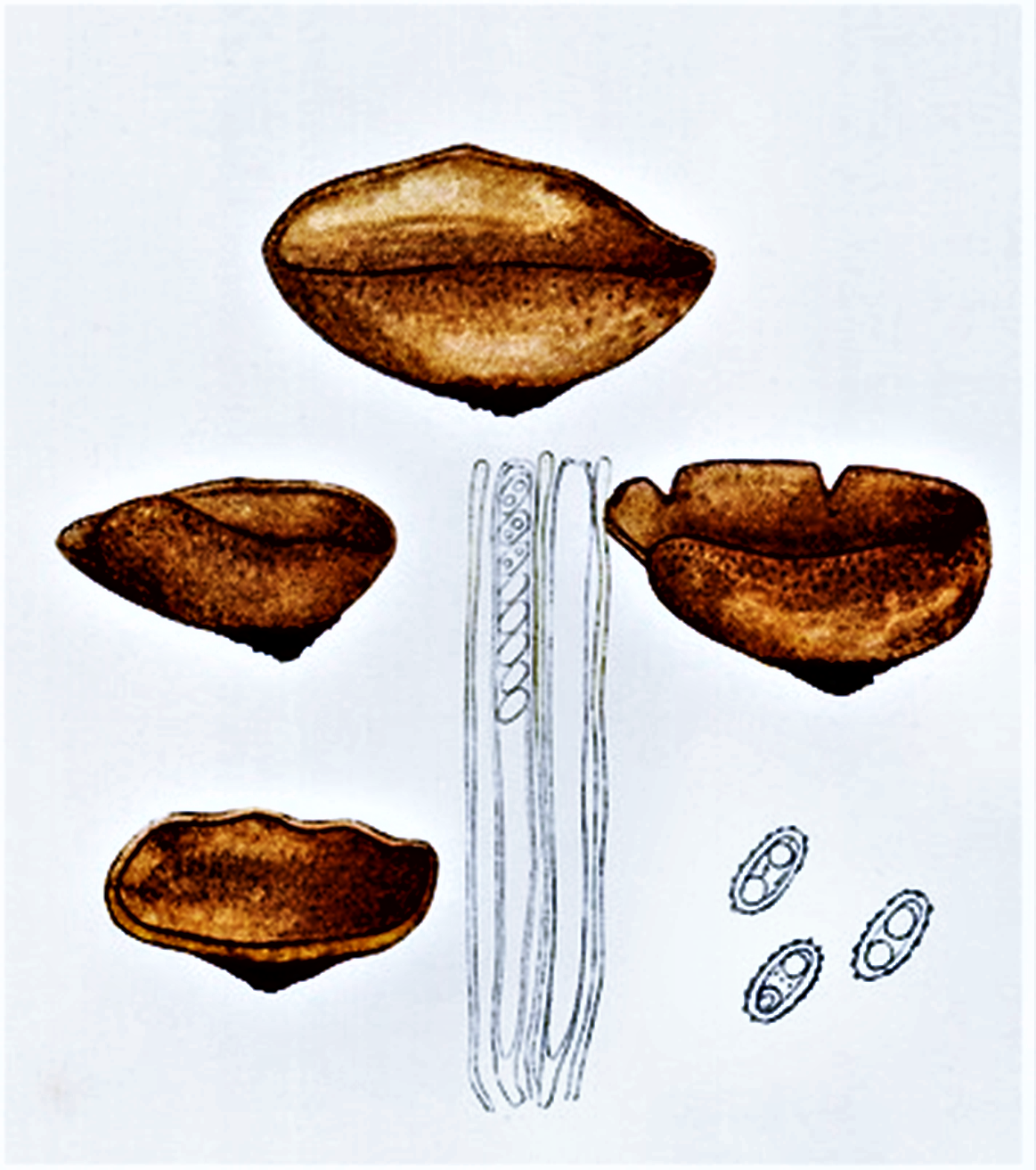 Giacomo Bresadola: Aleuria badia (Gillet), heute: Peziza badia (Pers.)